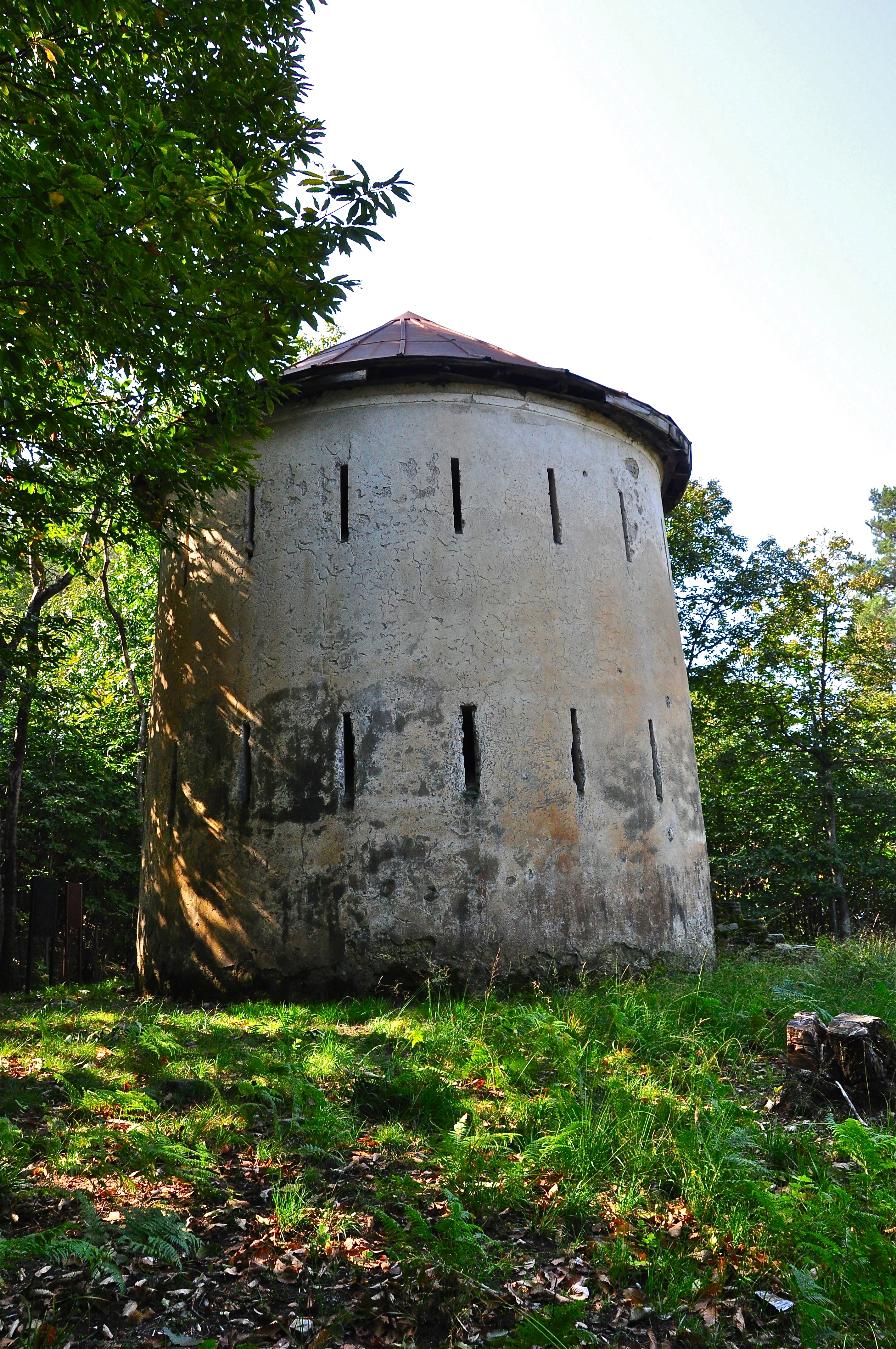 La quinta torre "Ai Pian di Bur"